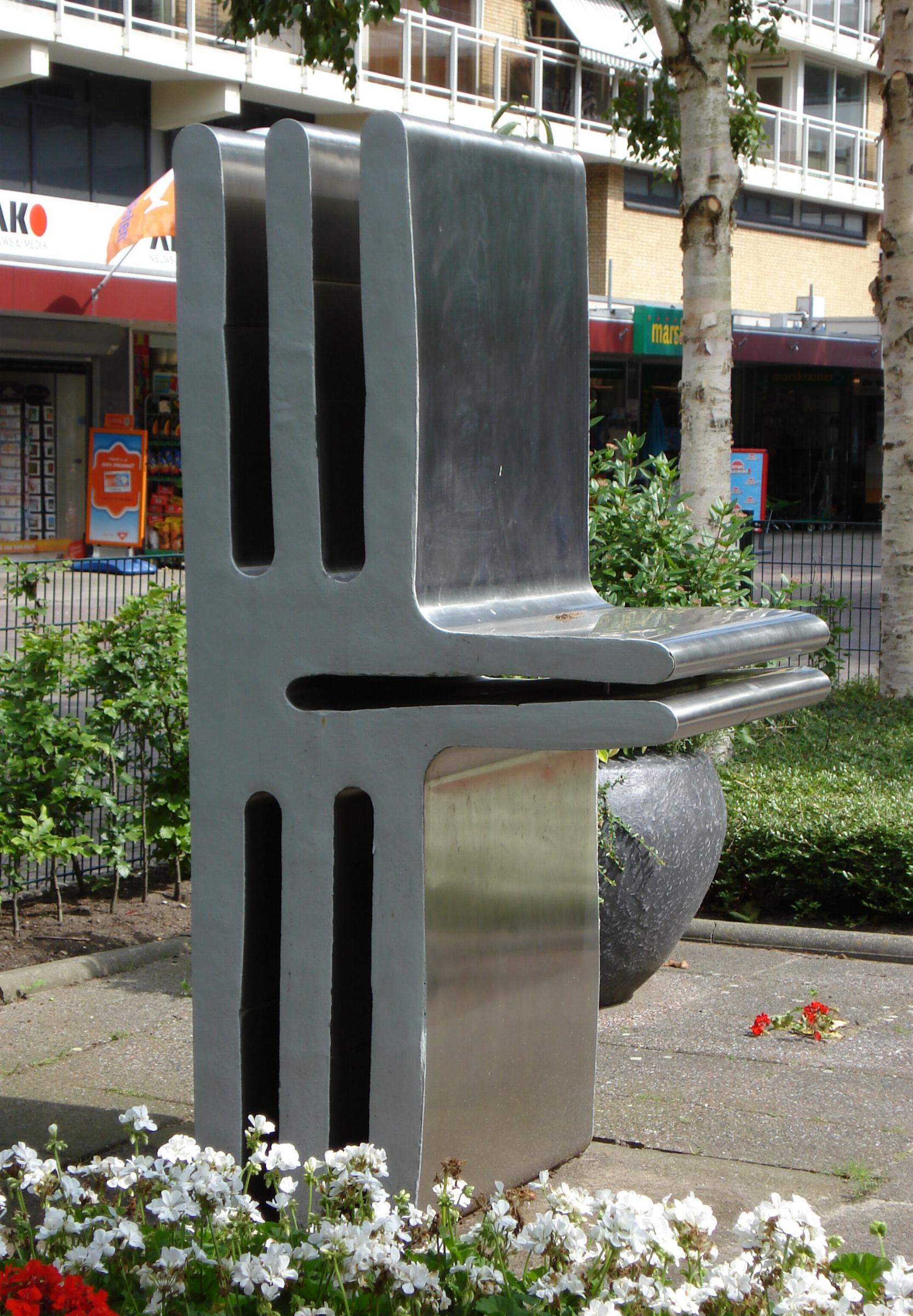 Rotterdam Alexanderpolder, Samuel Esmeijerplein. Kunstwerk Herdenkingsmonument 1940 - 1945 van Robert Maingay. Rotterdam/The Netherlands.